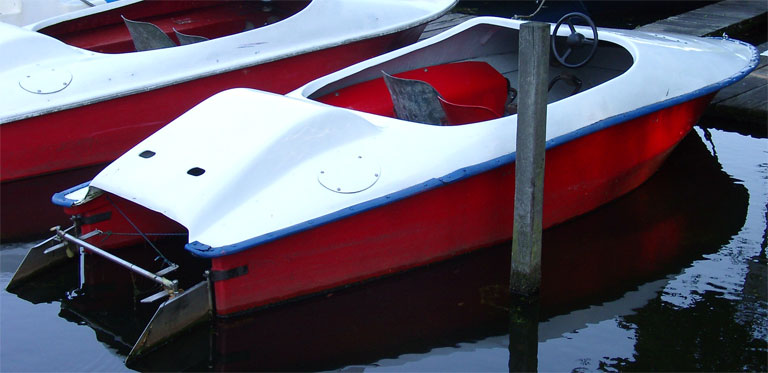 Ein Tretboot